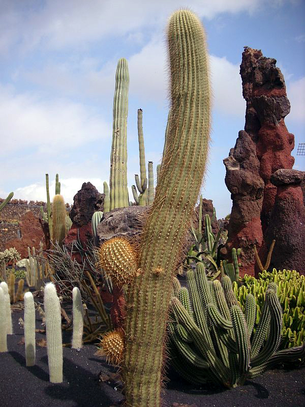 Cereus Gruppe